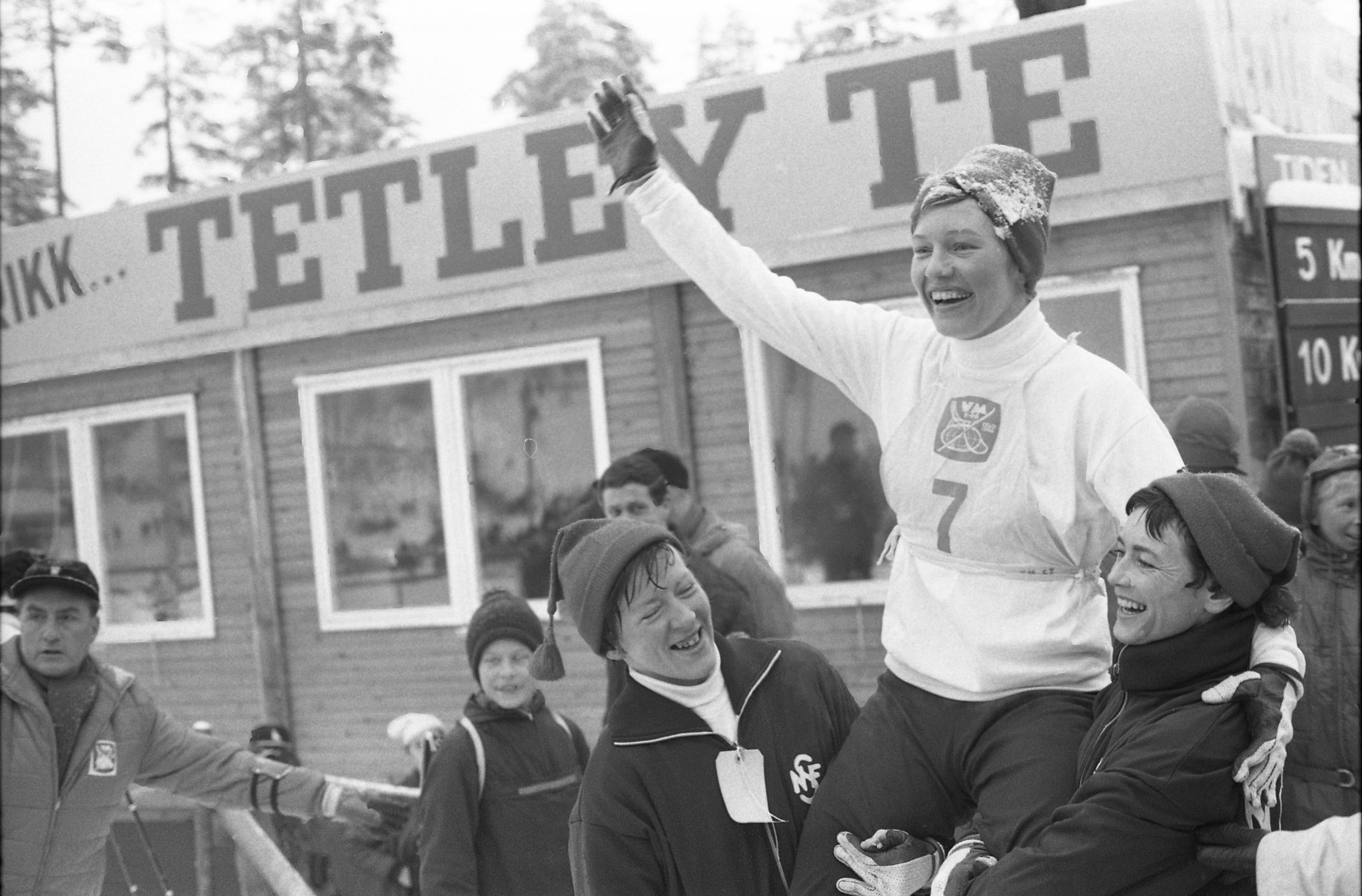 Beskrivelse: Ingrid Wigernæs, Inger Aufles, Berit Mørdre dannet det norske sølvlaget under staffeten for kvinner under verdensmesterskapet på ski i Oslo 1966 Fotograf: Billedbladet NÅ/Klæboe og Lauritzen Sted: Oslo År: 1966 Arkivreferanse: RIKSARKIVET- RA/PA/0797/U/Ua/3893_7_034